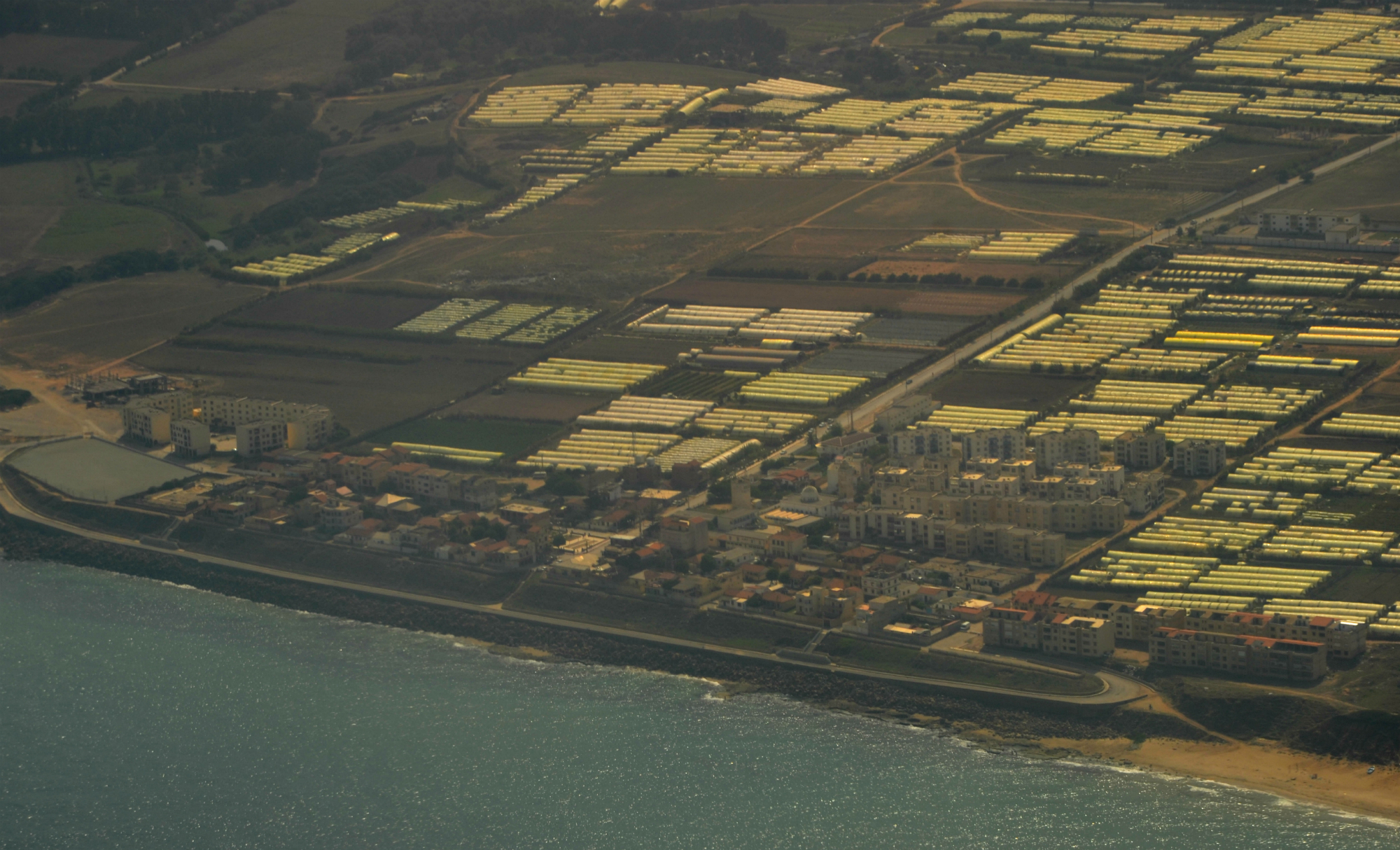 Photo aérienne de Boudouaou Marine depuis le nord